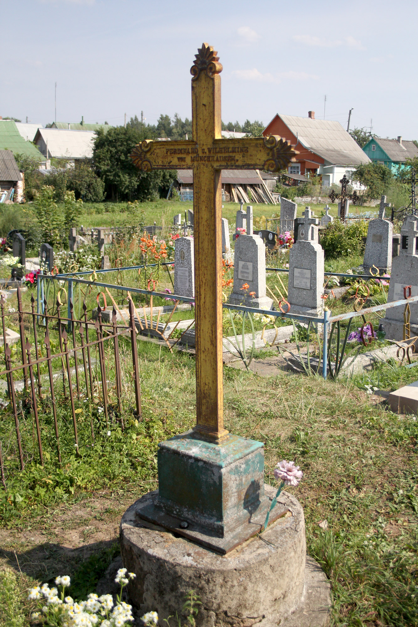 Беларуская (тарашкевіца): Крыж на месцы пахаваньня Фэрдынанда і Вільгельміны фон Мюнхгаўзэн